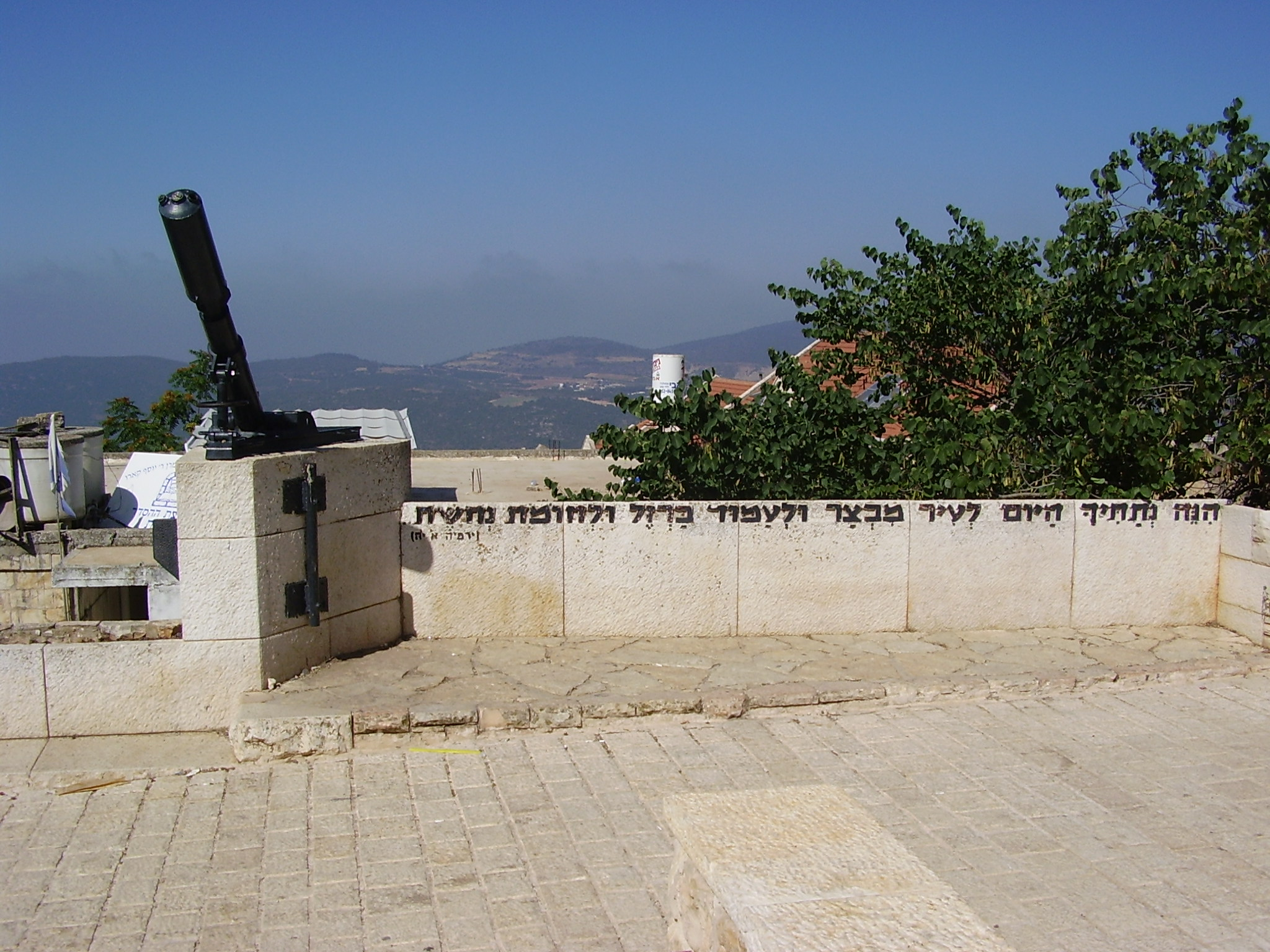 Davidka Square, Safed, Israel